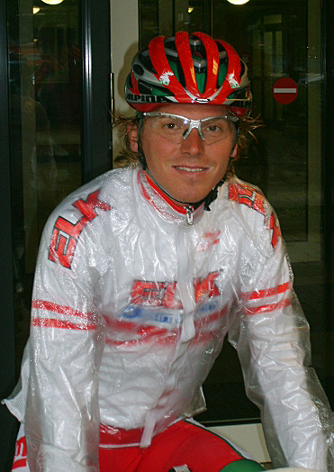 Christian Pfannberger vor dem Start der Deutschland-Tour 2007 in Saarbrücken